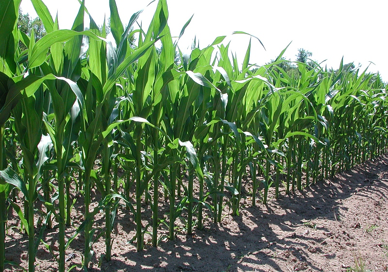 Mais, corn, Mörfelden, Deutschland, Germany